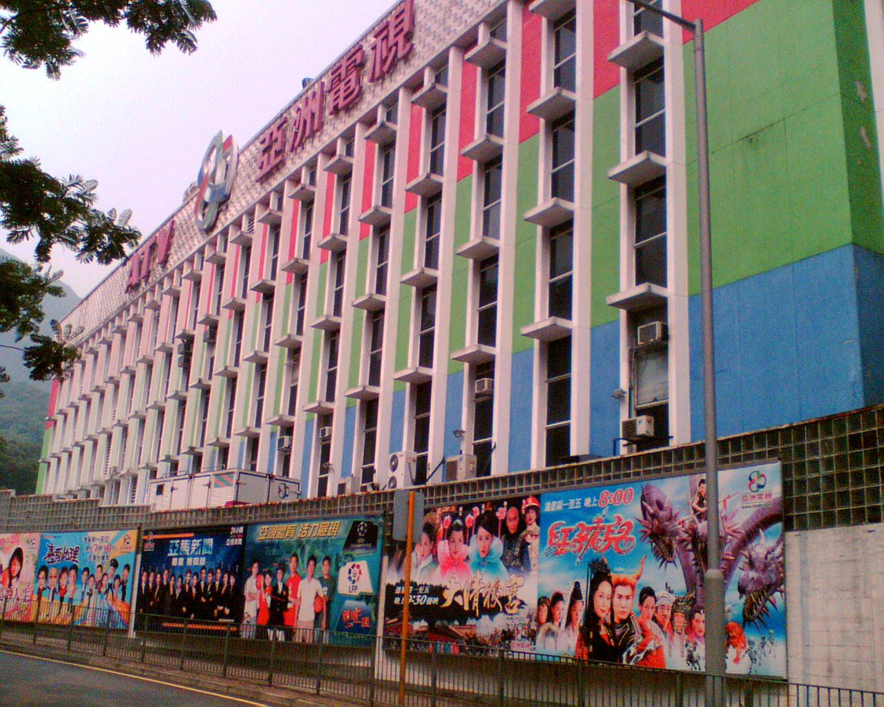 中文（香港）: 亞洲電視總部大廈位於廣播道81號。